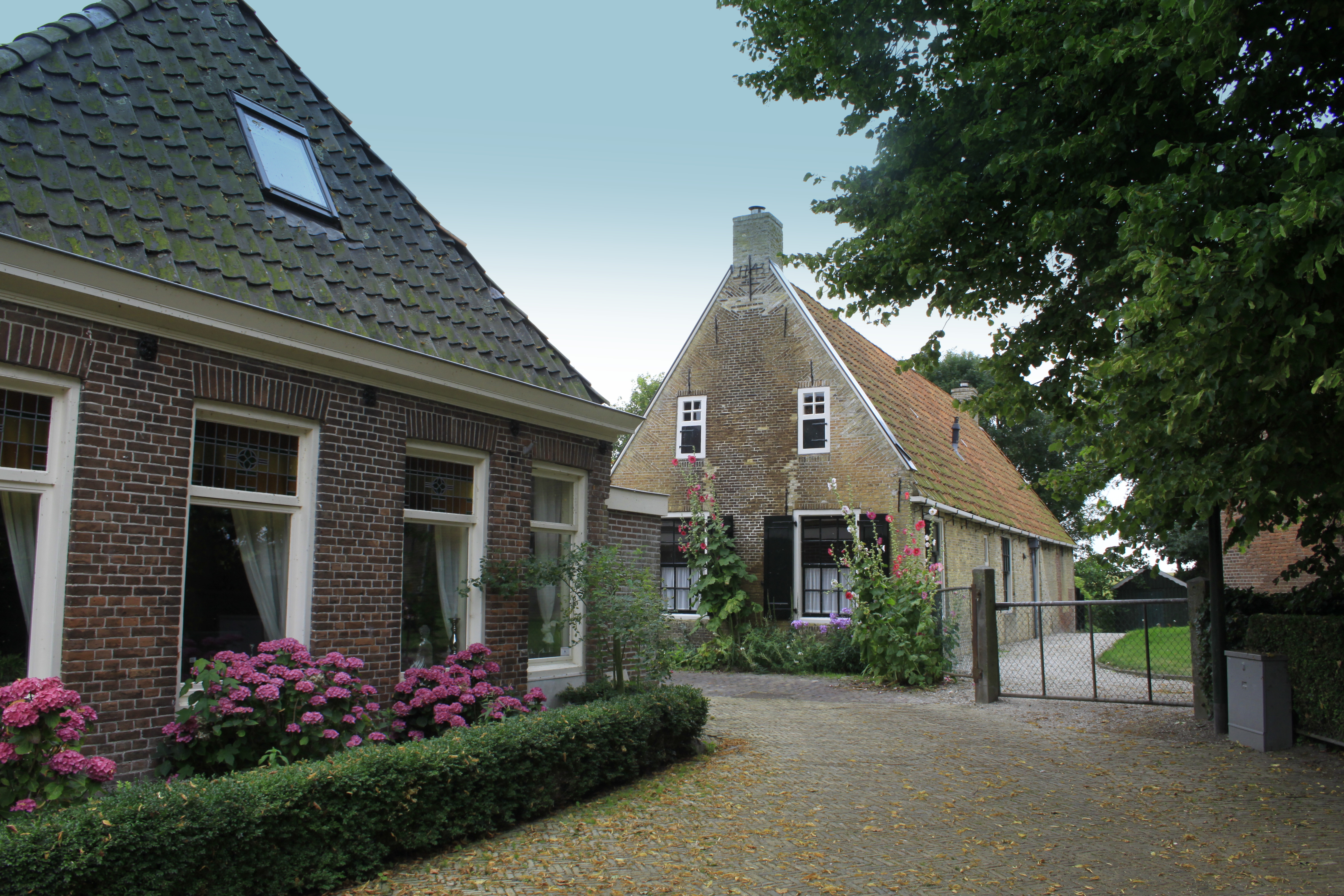 Het huis op de achtergrond is een Rijksmonument uit 1773. Het staat ook in de Buren in Gaast.